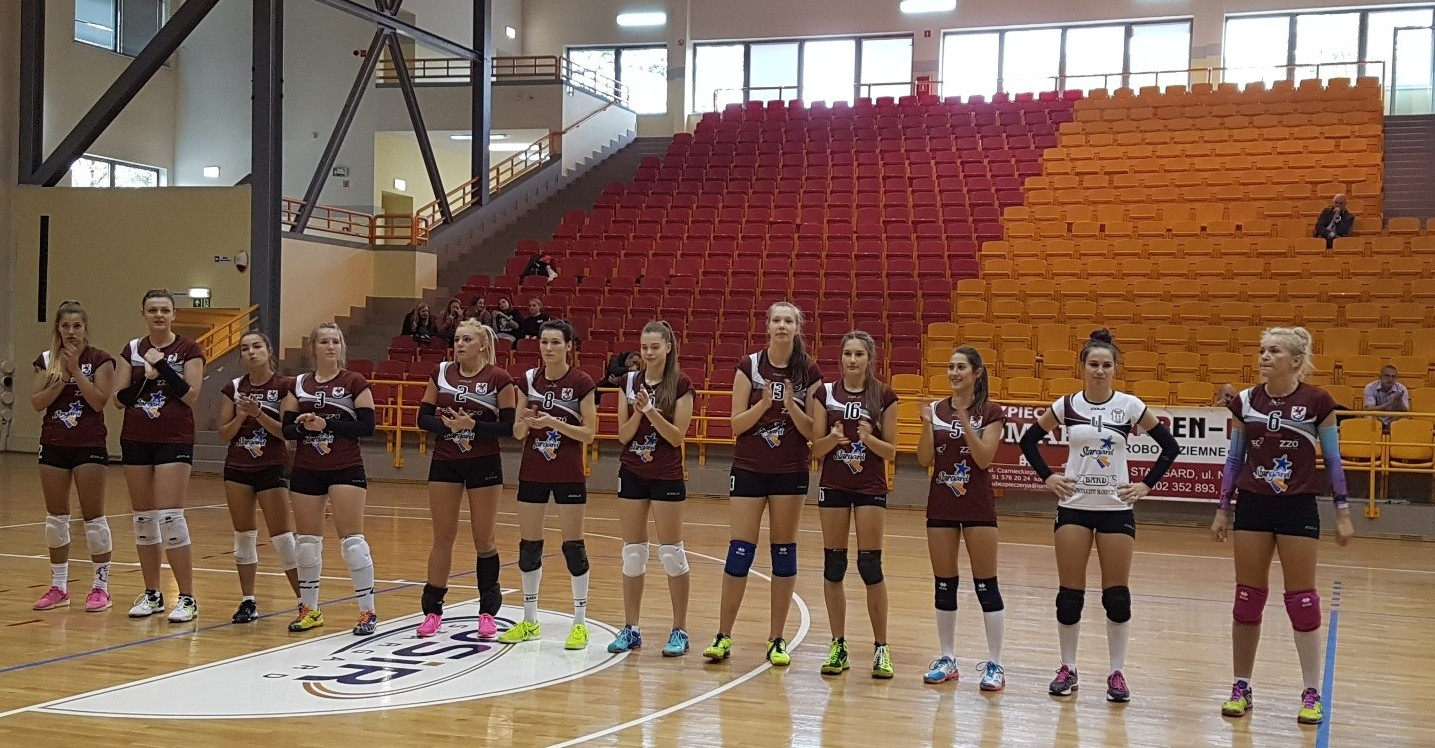 Stargard, 07.10.2017r. Spójnia Stargard siatkówka